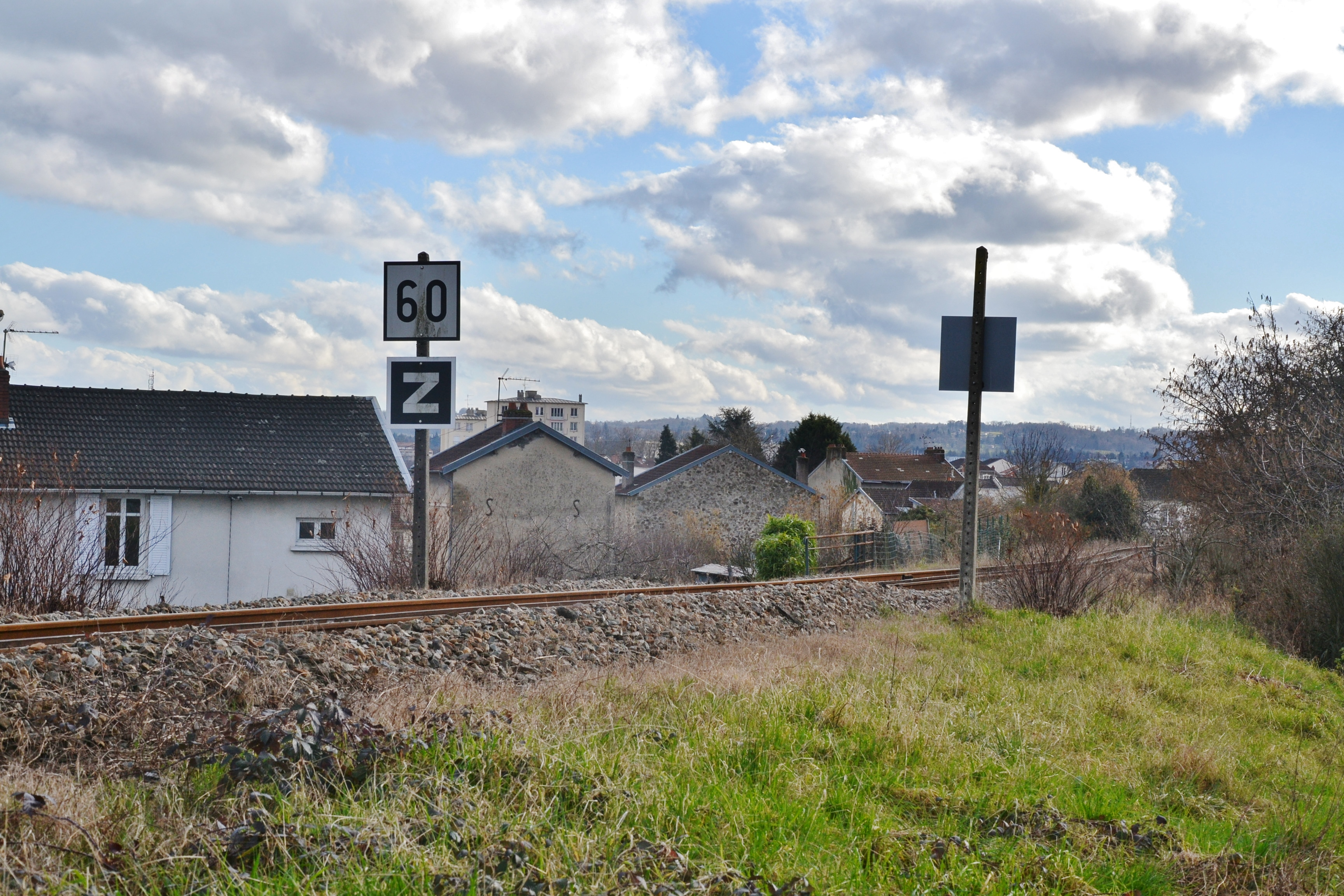 La ligne de Limoges à Angoulême dans le quartier de la Brégère (Limoges, Haute-Vienne, France).